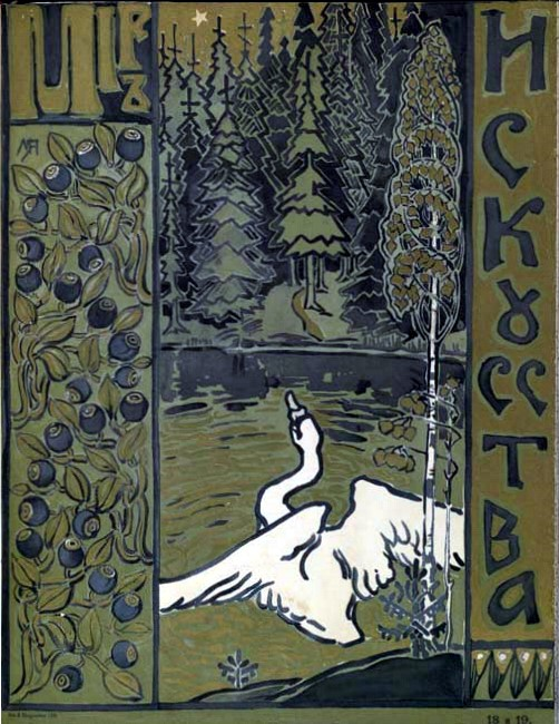 Дизайн обложки выполнен М. В. Якуниной-Вебер